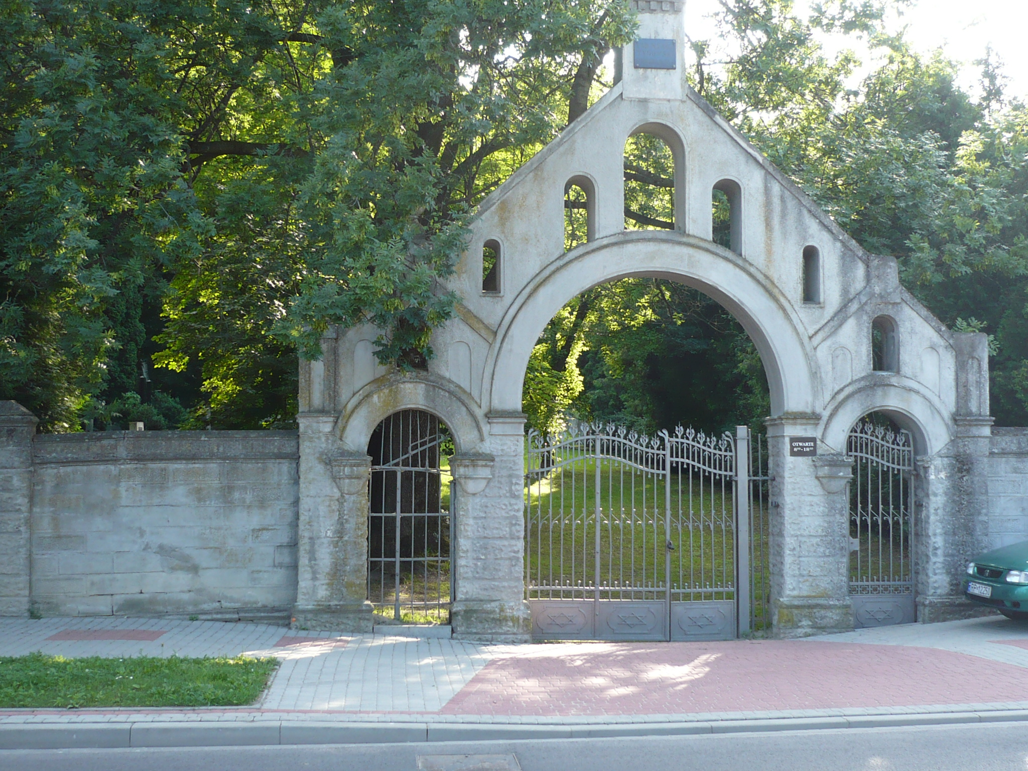 Przemyśl, nowy cmentarz żydowski